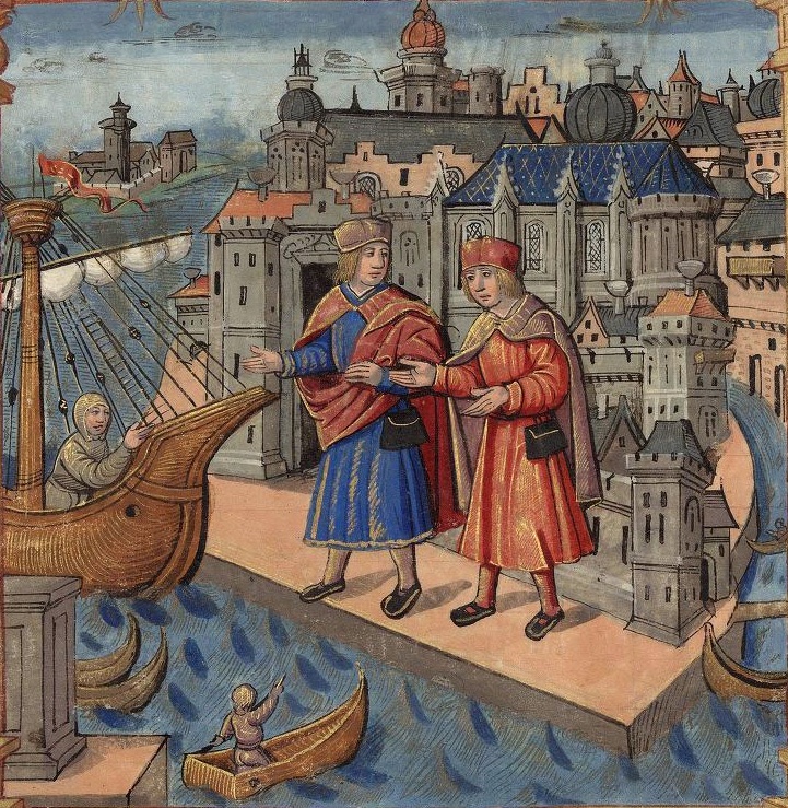 Торговля в морском порту. Гравюра из "Книги" Марко Поло, издания XVI века